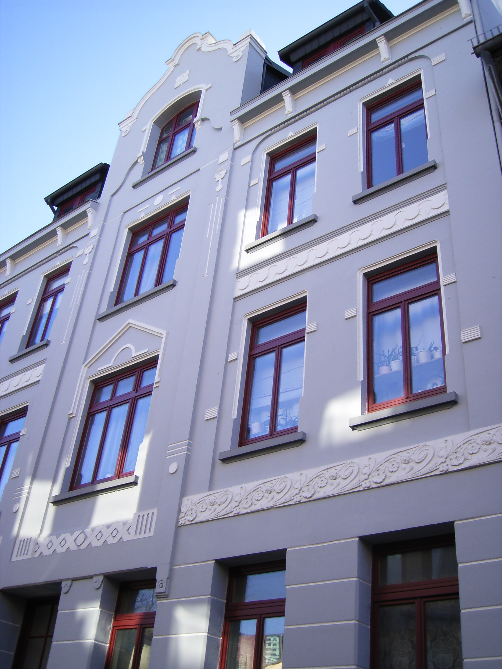 Sanierter Altbau im Phoenixviertel HH-Harburg